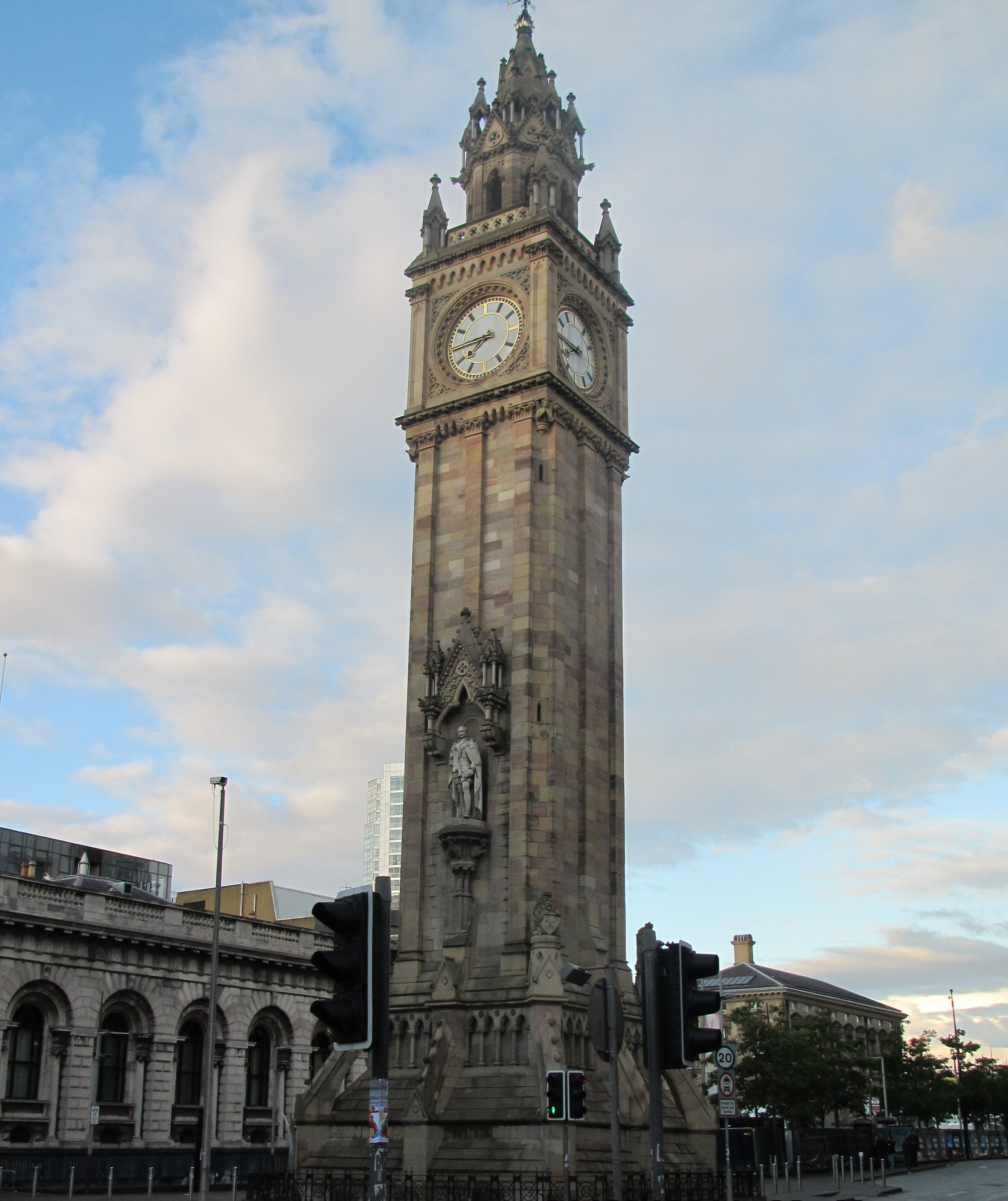 Albert Memorial Clock in Belfast by Paride